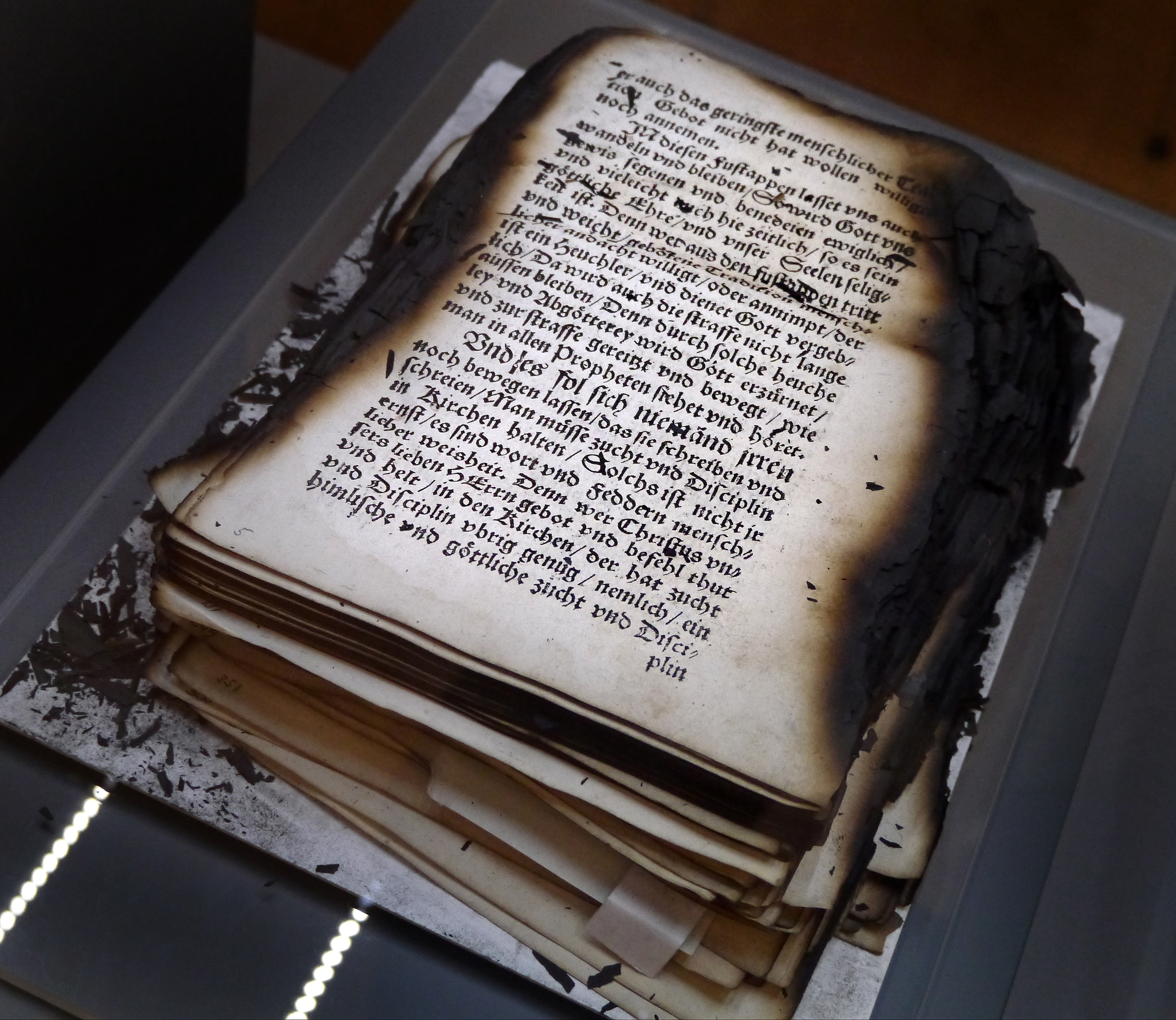 Anna-Amalia-Bibliothek - durch Brand weitgehend zerstörtes Buch